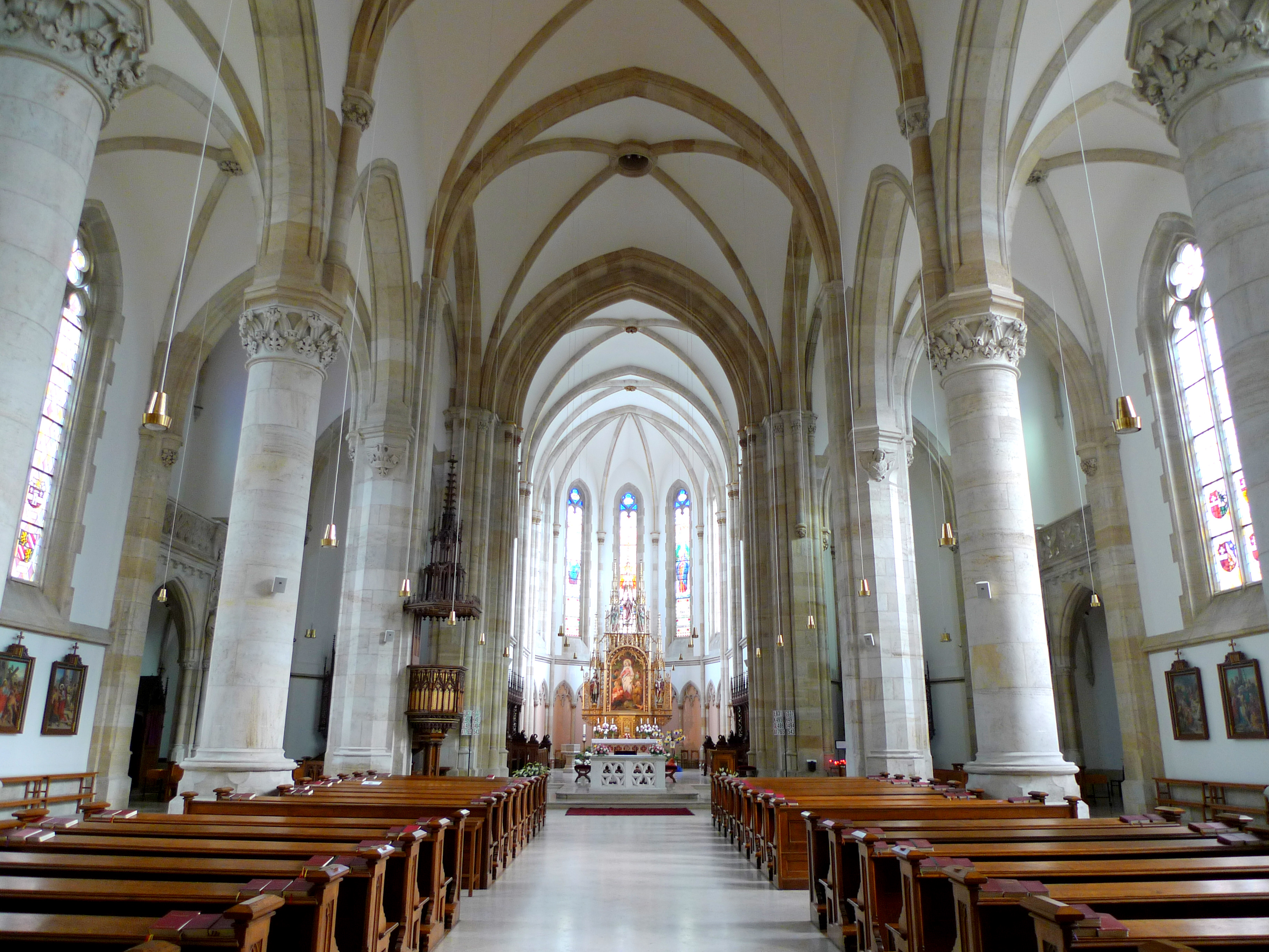 Elisabethkirche Wieden innen